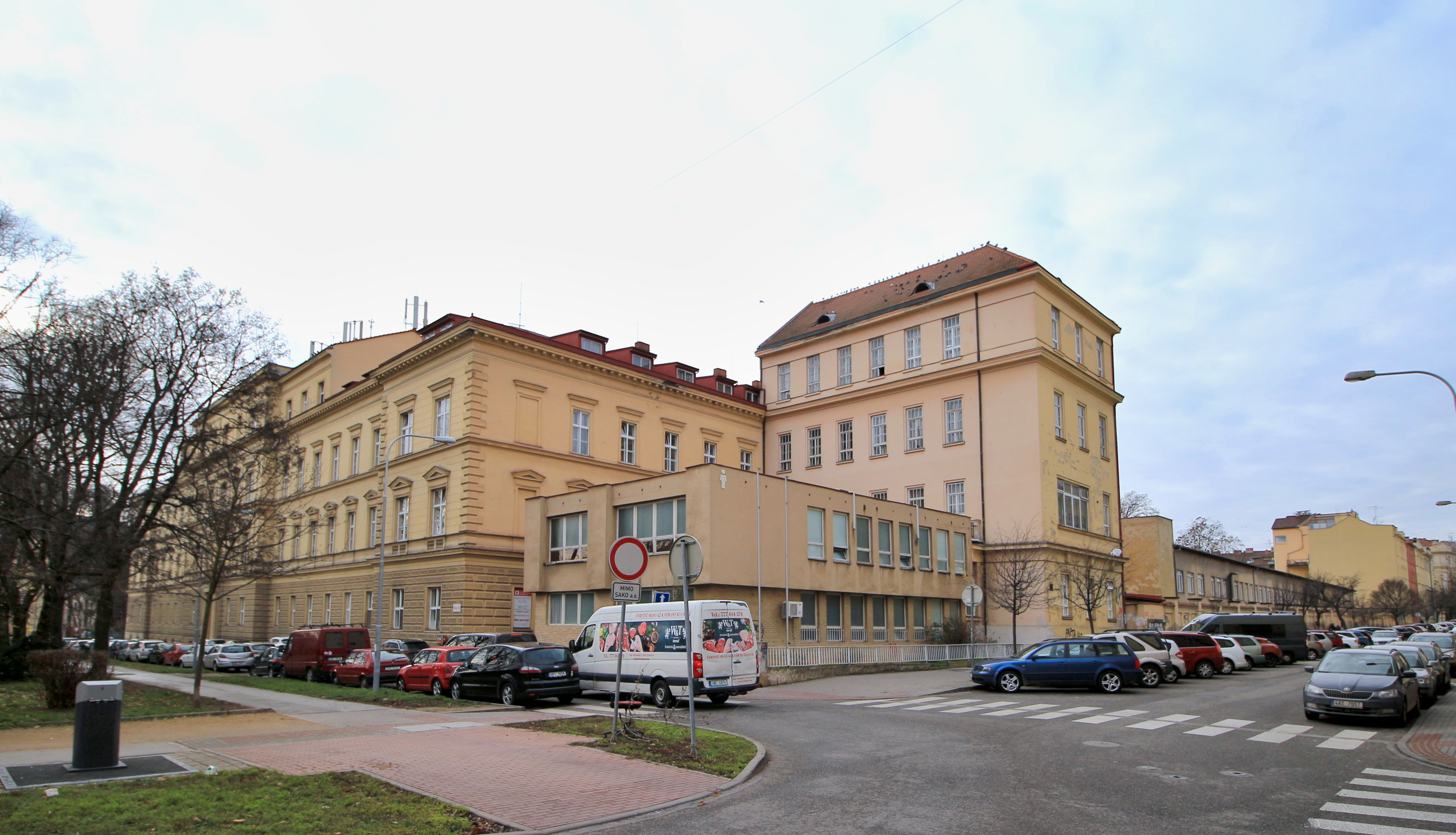 Brno Obilní trh